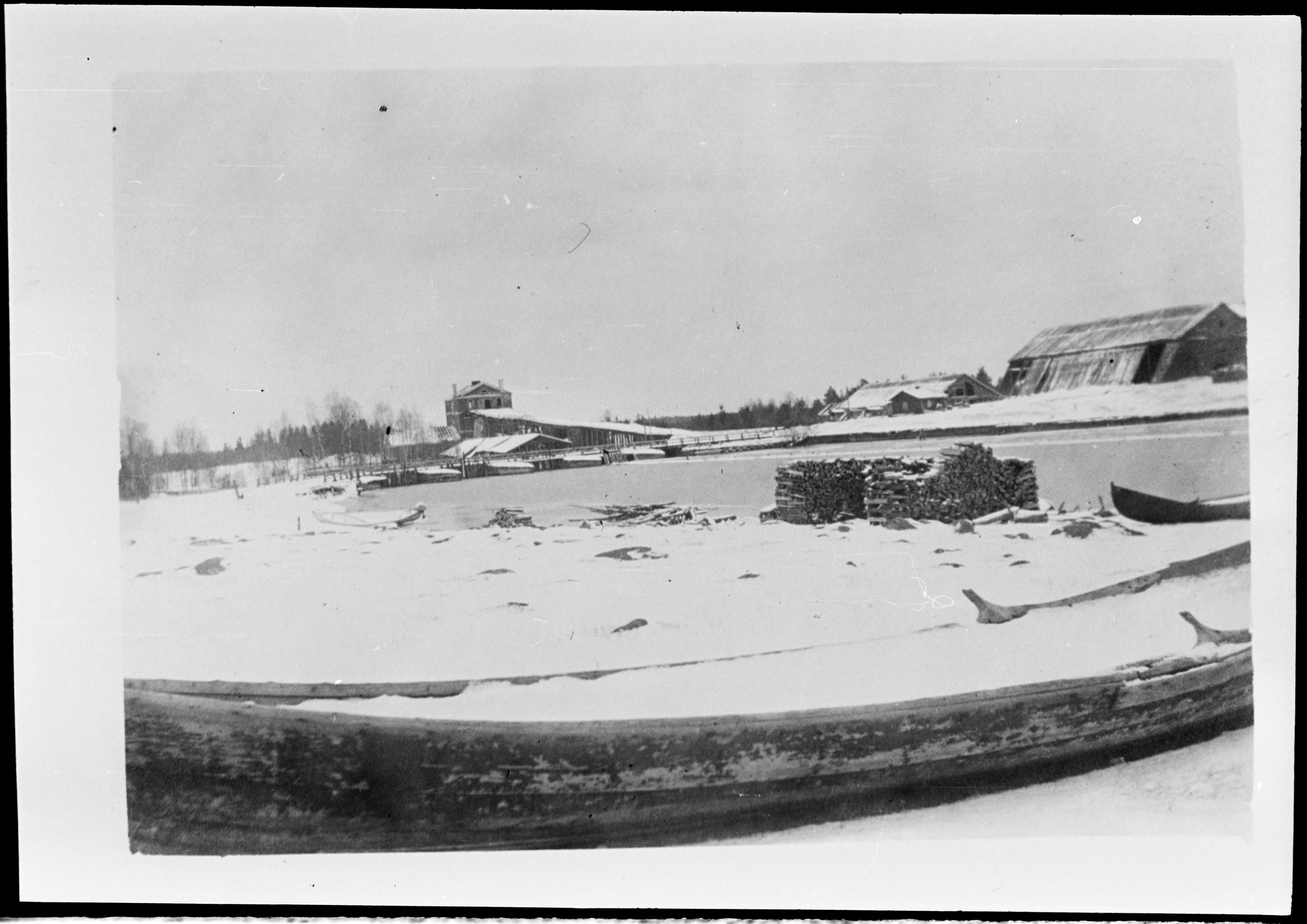 Annantehdas Karatsalmella Suojärvellä